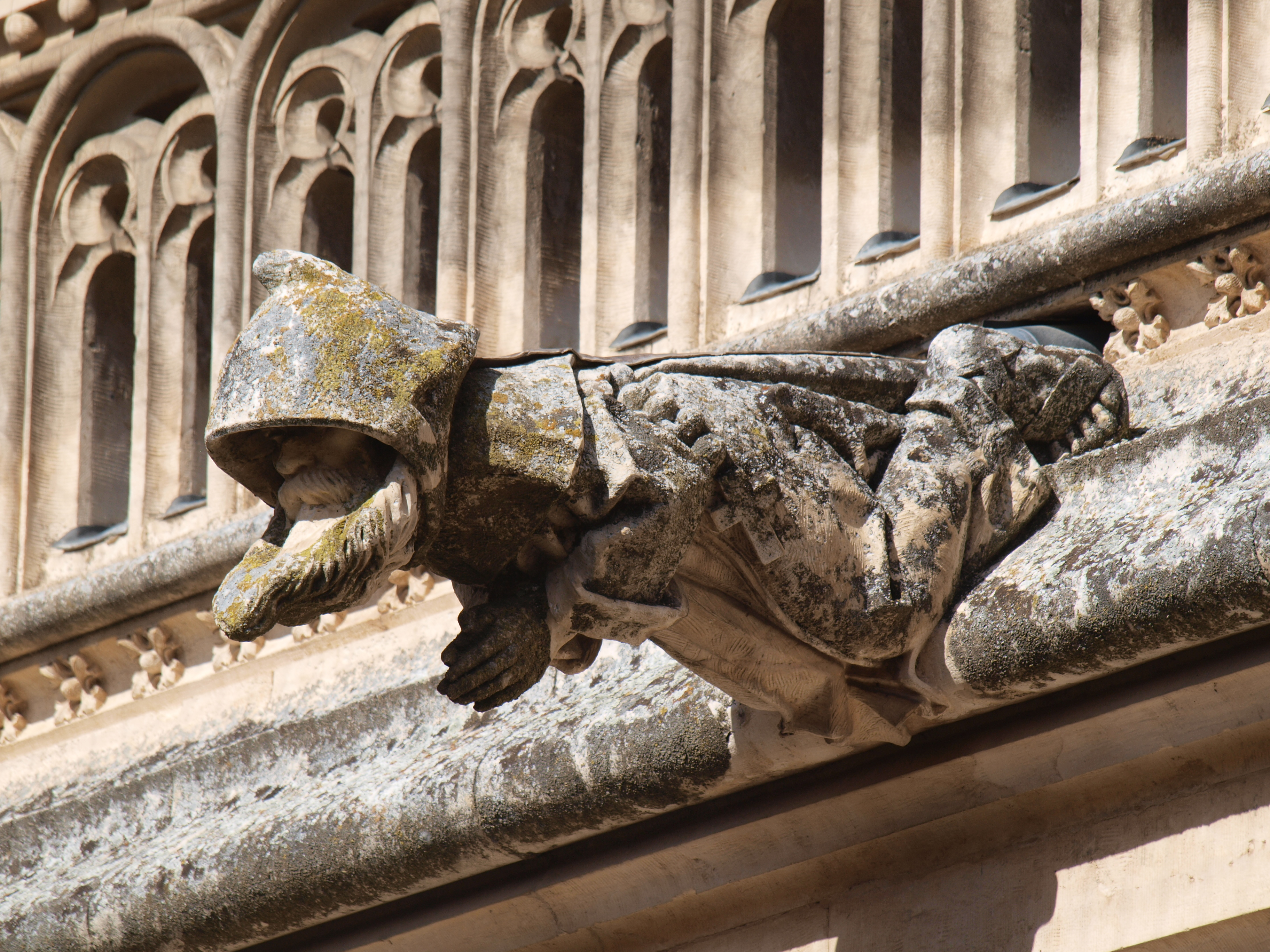 Gárgola de un monje en el claustro del Monasterio de San Juan de los Reyes